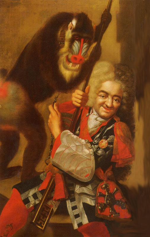 Perkeo. Heidelberg,Pfalzisches museum